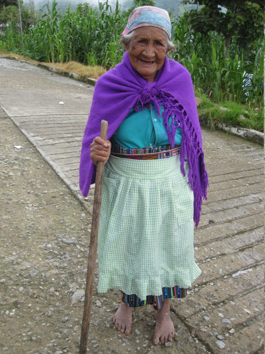 Doña Mati es una señora de avanzada edad, vive en el Ejido Pavencul, Municipio de Tapachula, Chiapas, México. Ella pertenece a la cultura Mame, es una de las pocas mujeres de la comunidad que conserva sus tradiciones y costumbres. Desde hace algunos años había querido fotografiarla pero hasta ahora lo pude hacer.